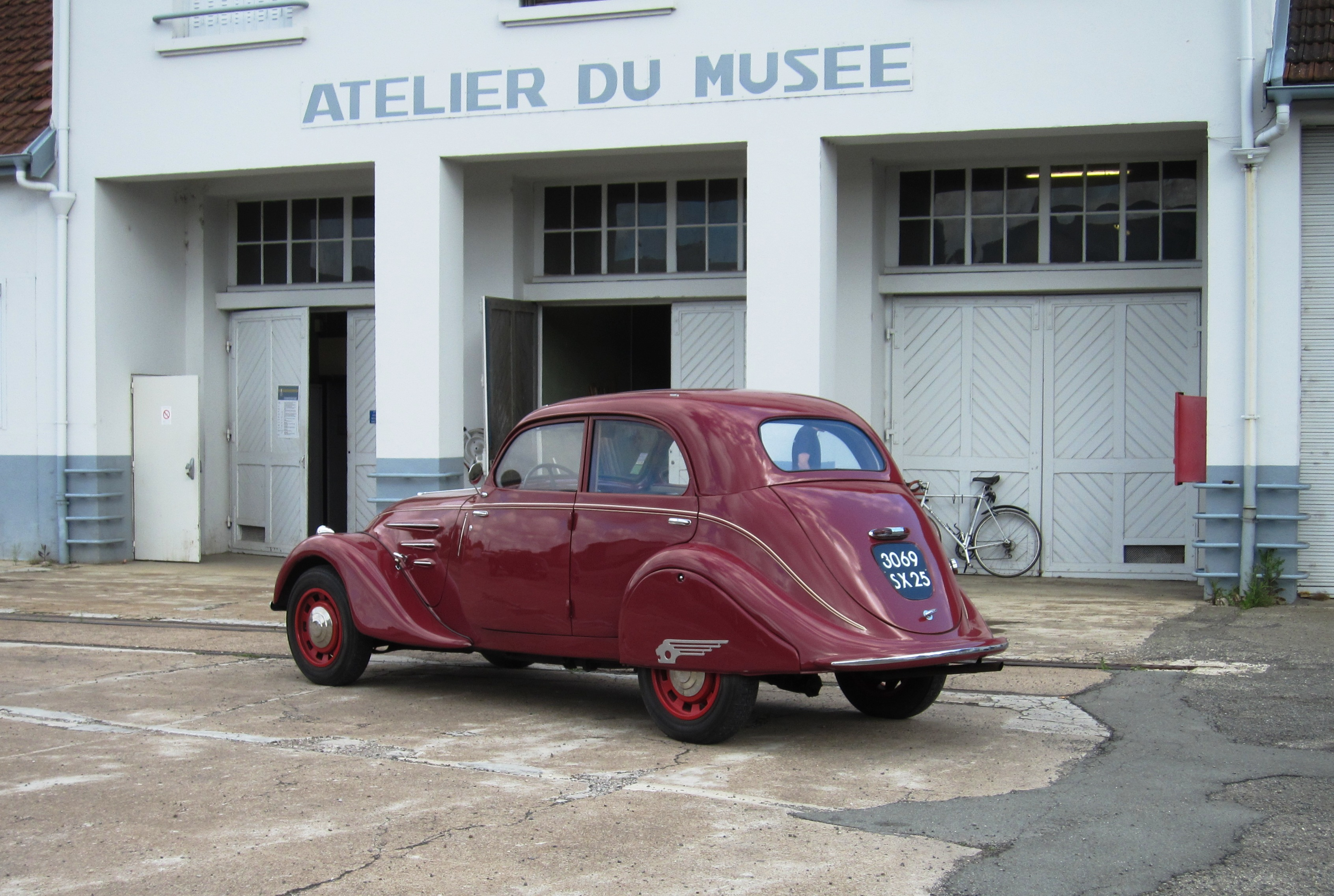 Musée de l'Aventure Peugeot - les ateliers avec Peugeot 402 Légère